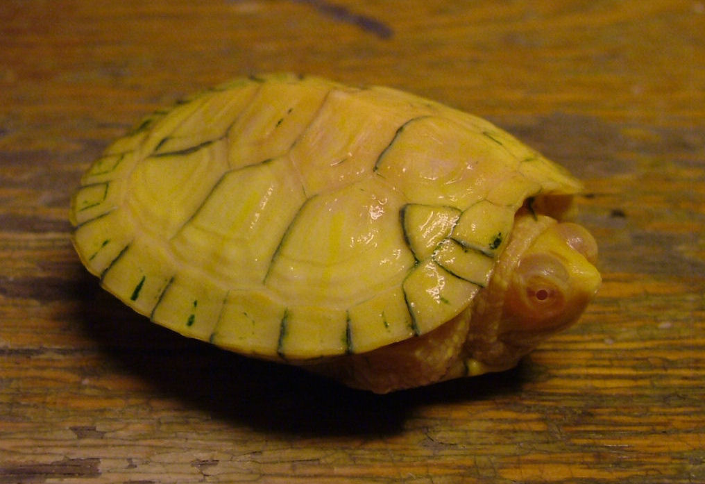 Trachemys scripta elegans albina, Roma Italia